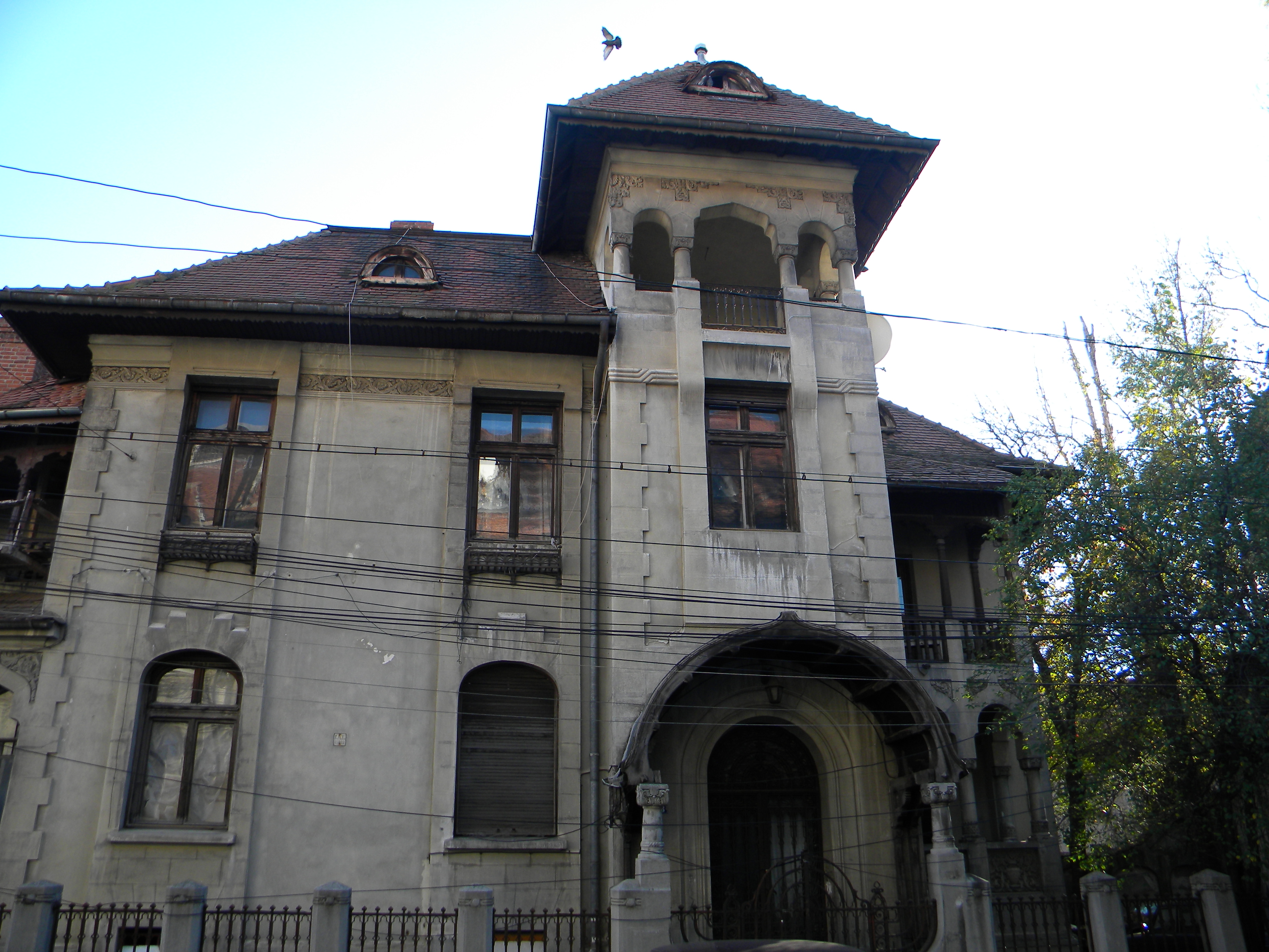 Bucuresti, Romania, Str. Alexandru Philippide nr. 8, sect. 2 (Cod B-II-m-B-19380) ( prim2)